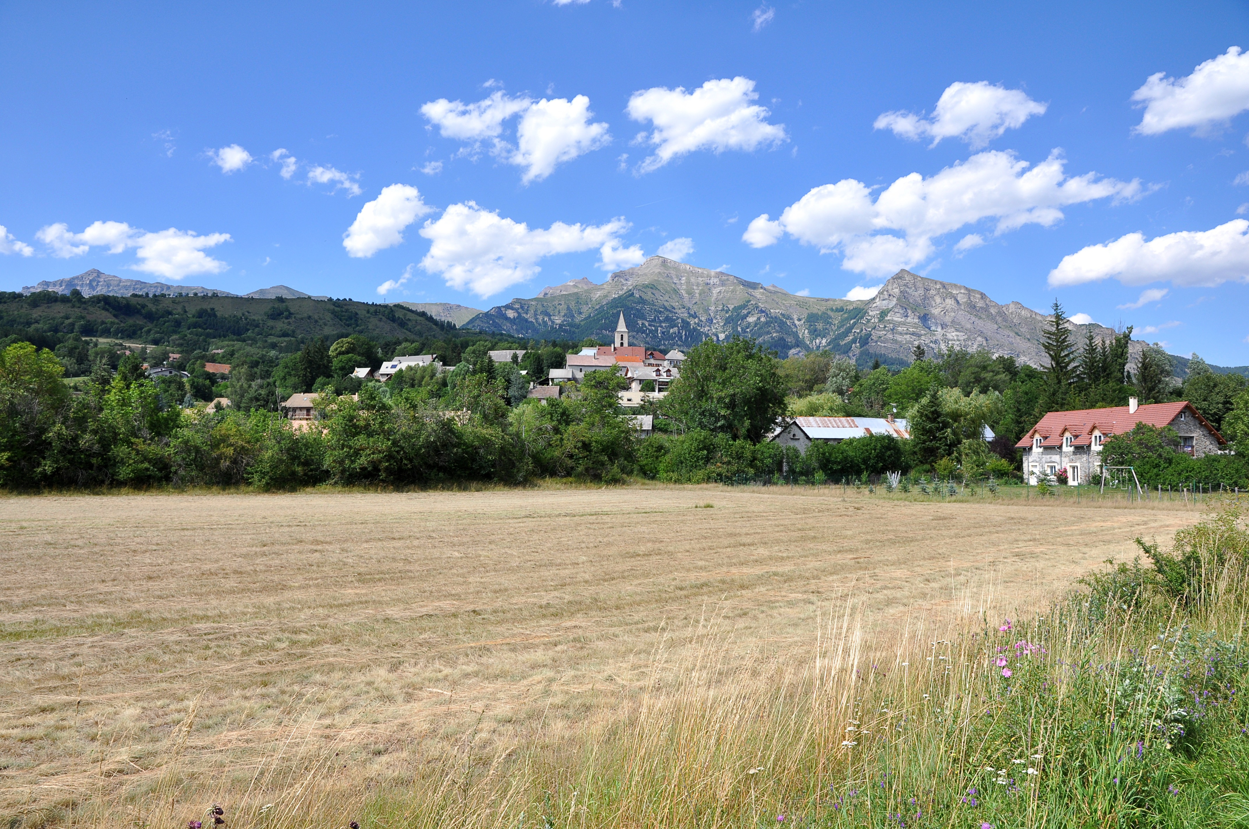 Au fond du champ le village de Chabottes